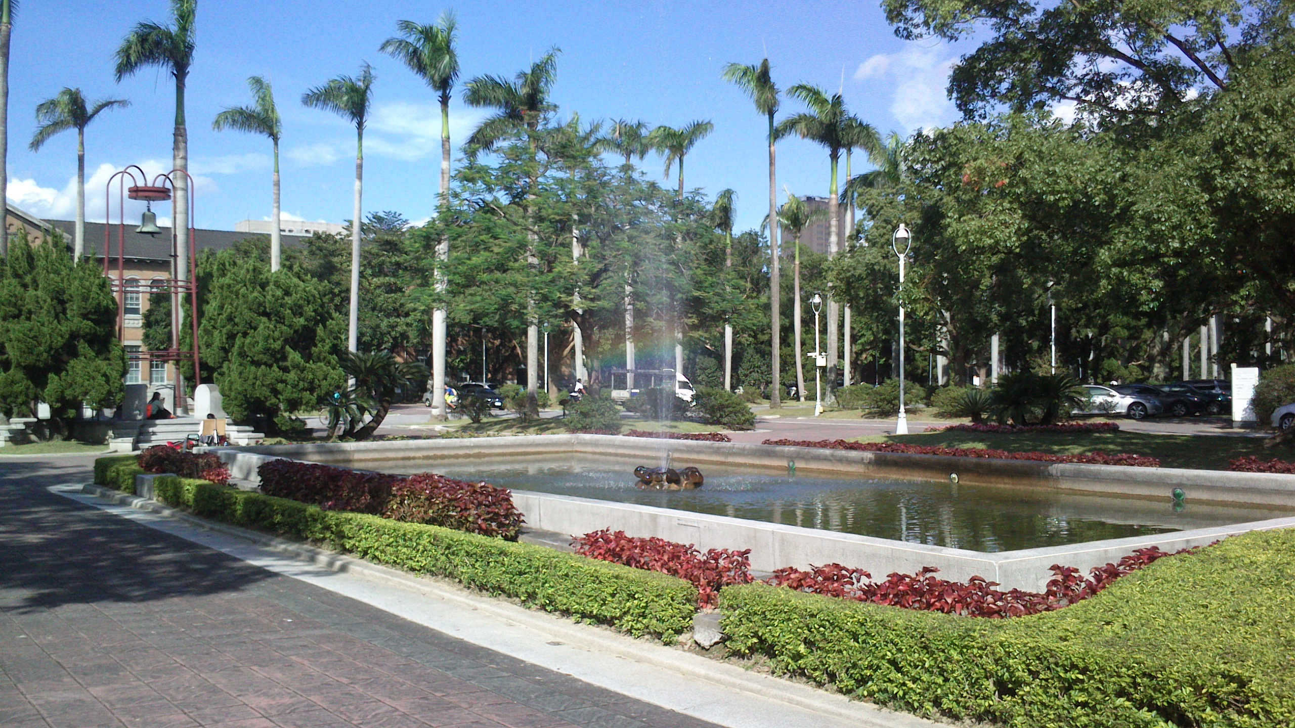 臺大行政大樓前的噴水池